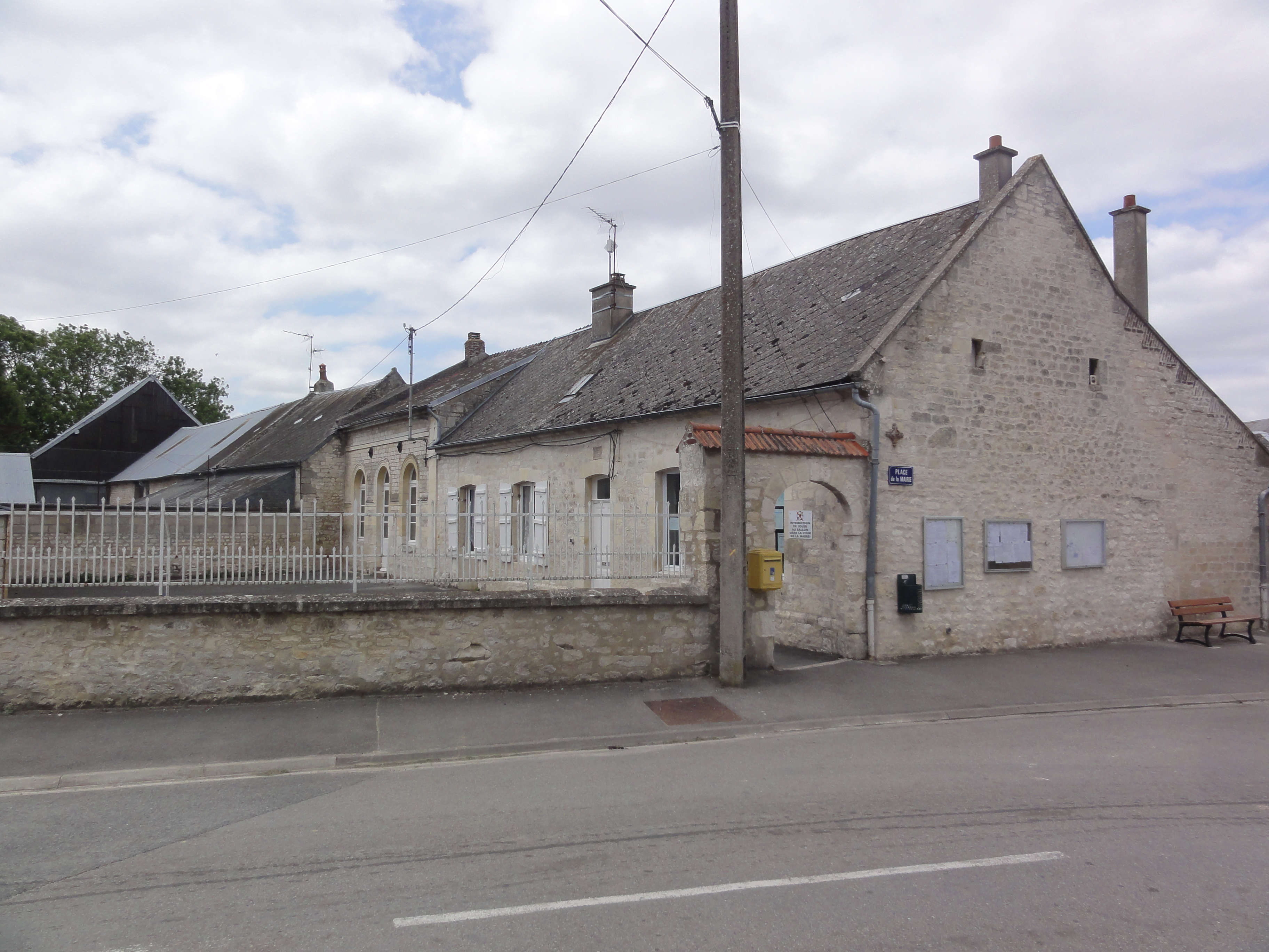 Mâchecourt (Aisne) mairie